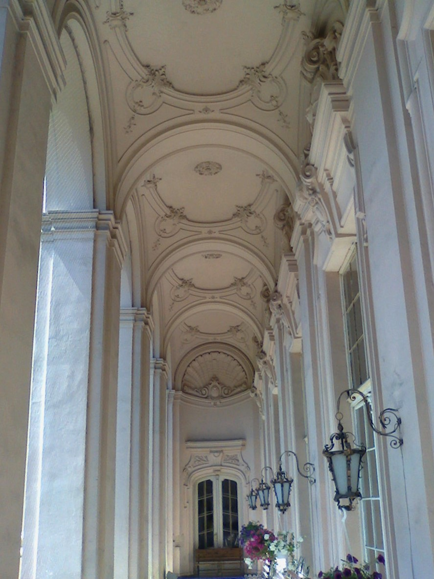 Lwów. Kasyno szlacheckie